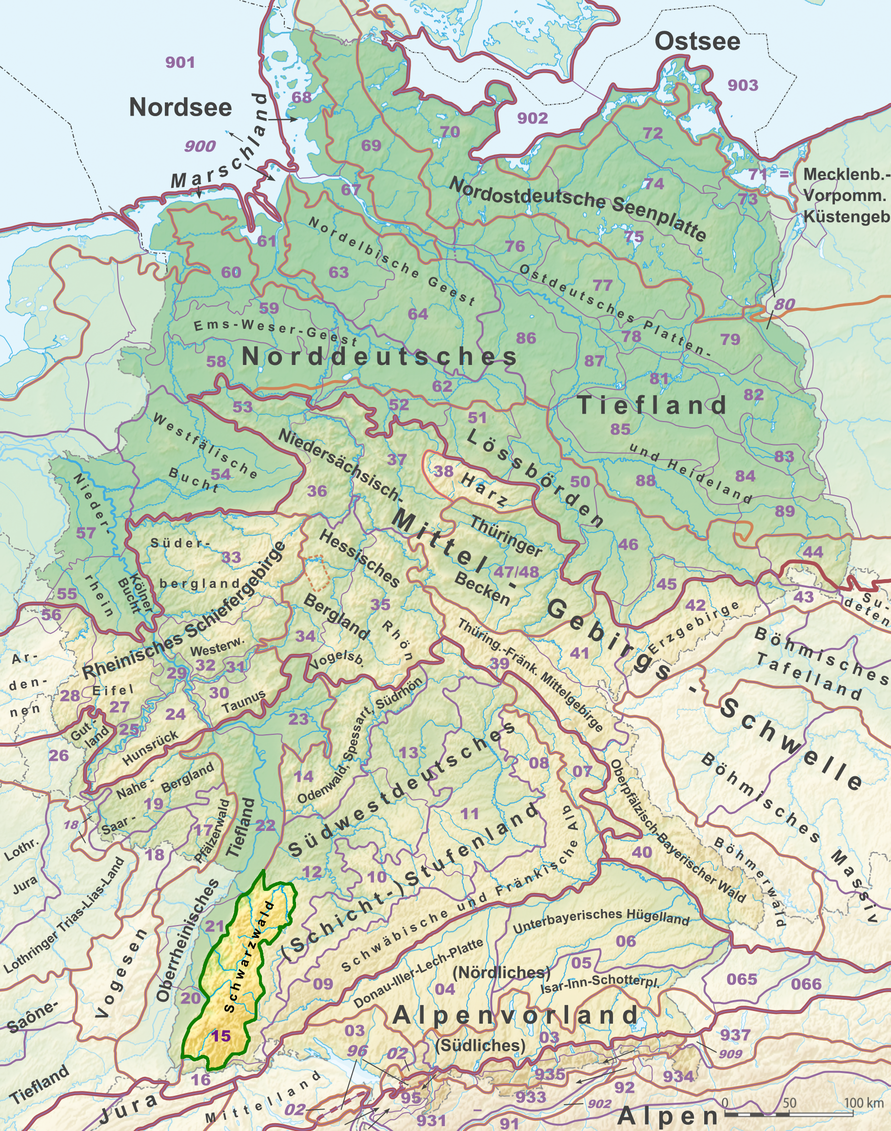 Der Schwarzwald (grün umrandet und in leuchtendem Farbton) auf der Karte der Naturräumlichen Großregionen Deutschlands; Großregionen 3. Ordnung nach dem Handbuch der naturräumlichen Gliederung Deutschlands. Beschreibung siehe File:Naturraeumliche Grossregionen Deutschlands plus.png.